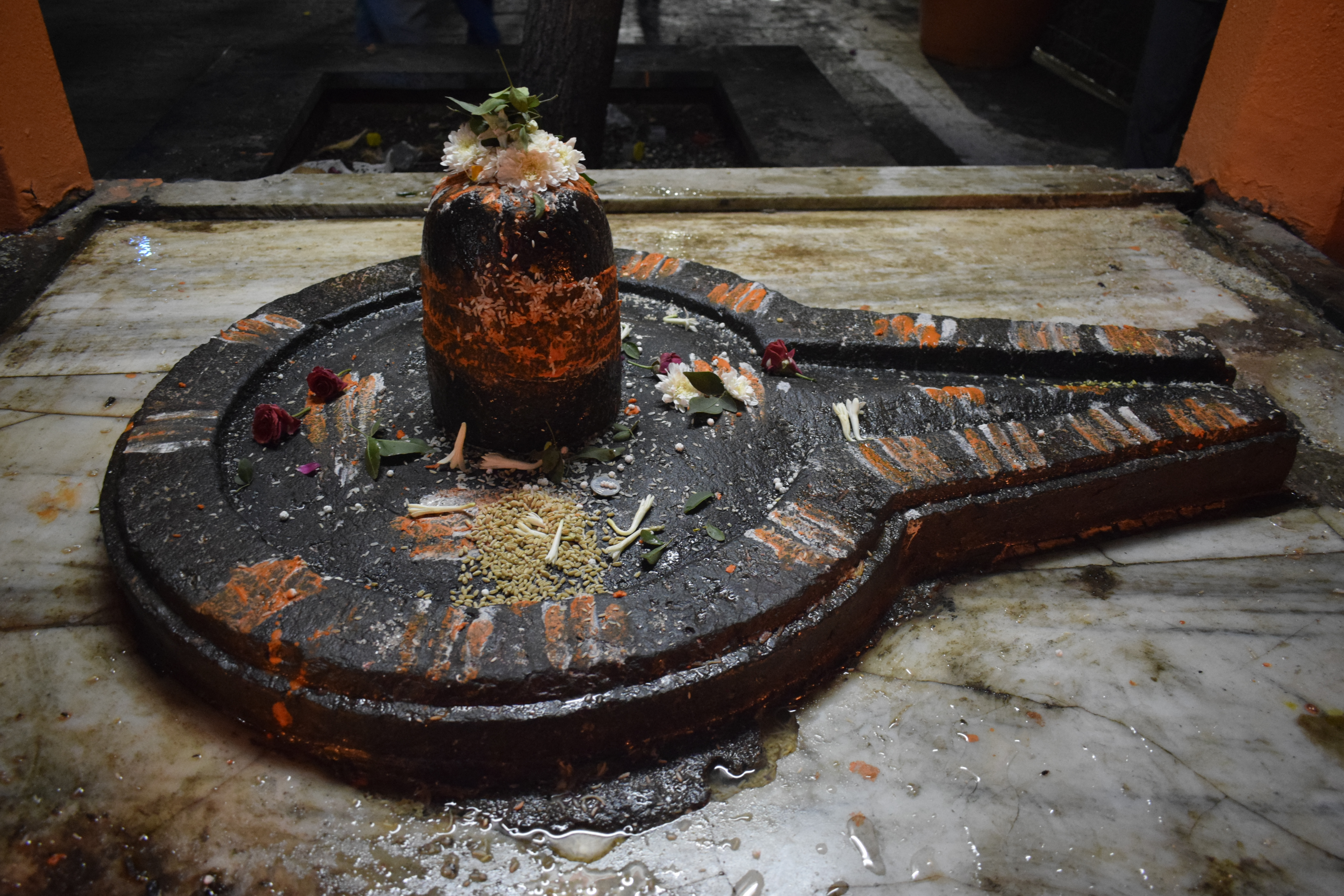 श्री आनंदेश्वर लिंग